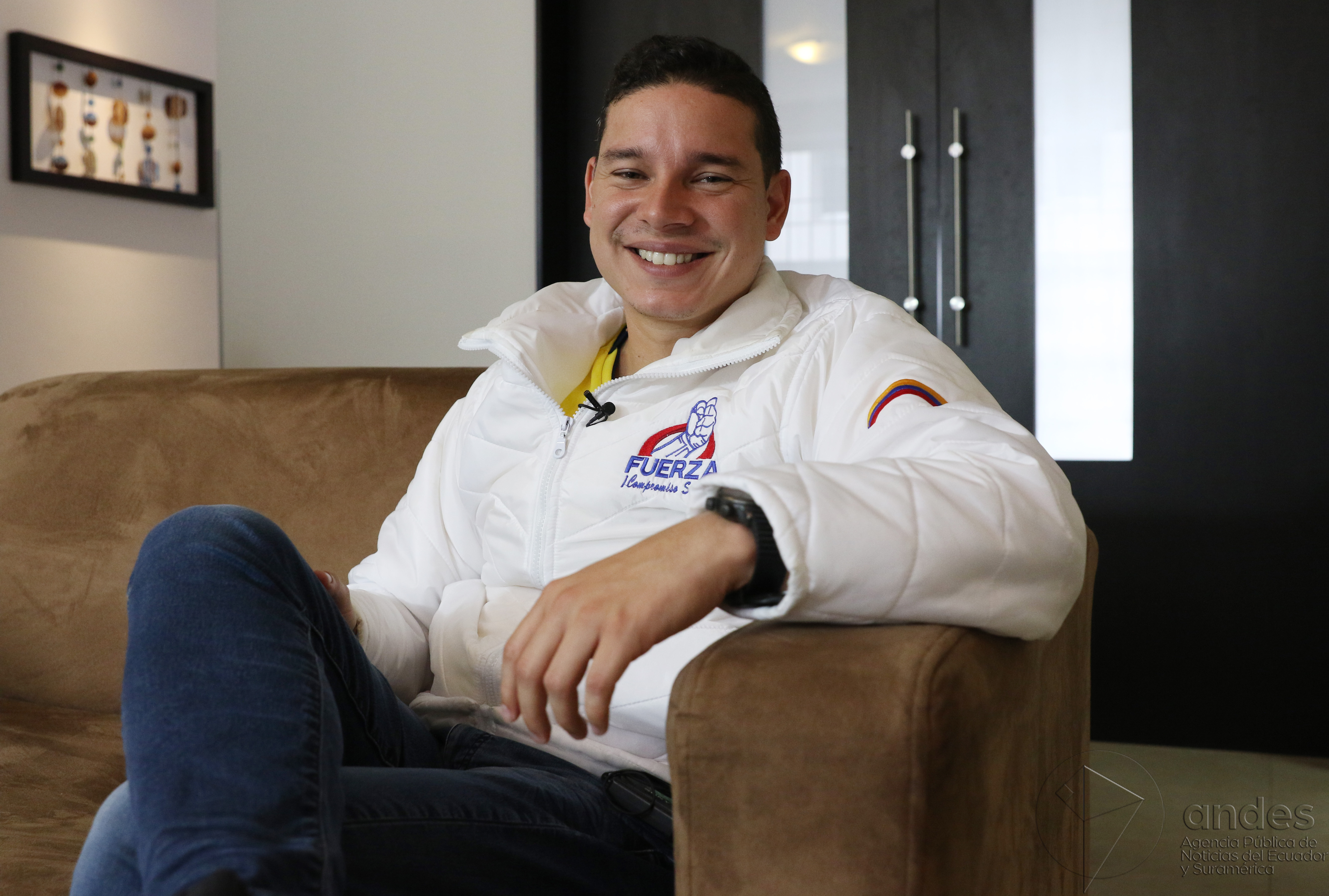 Quito, 14 de marzo de 2017(Andes).- Iván Espinel, ex candidato a la Presidencia de la República por el Movimiento Fuerza Compromiso Social habló para la Agencia Andes acerca de su respaldo a Lenín Moreno. ANDES/Micaela Ayala V.